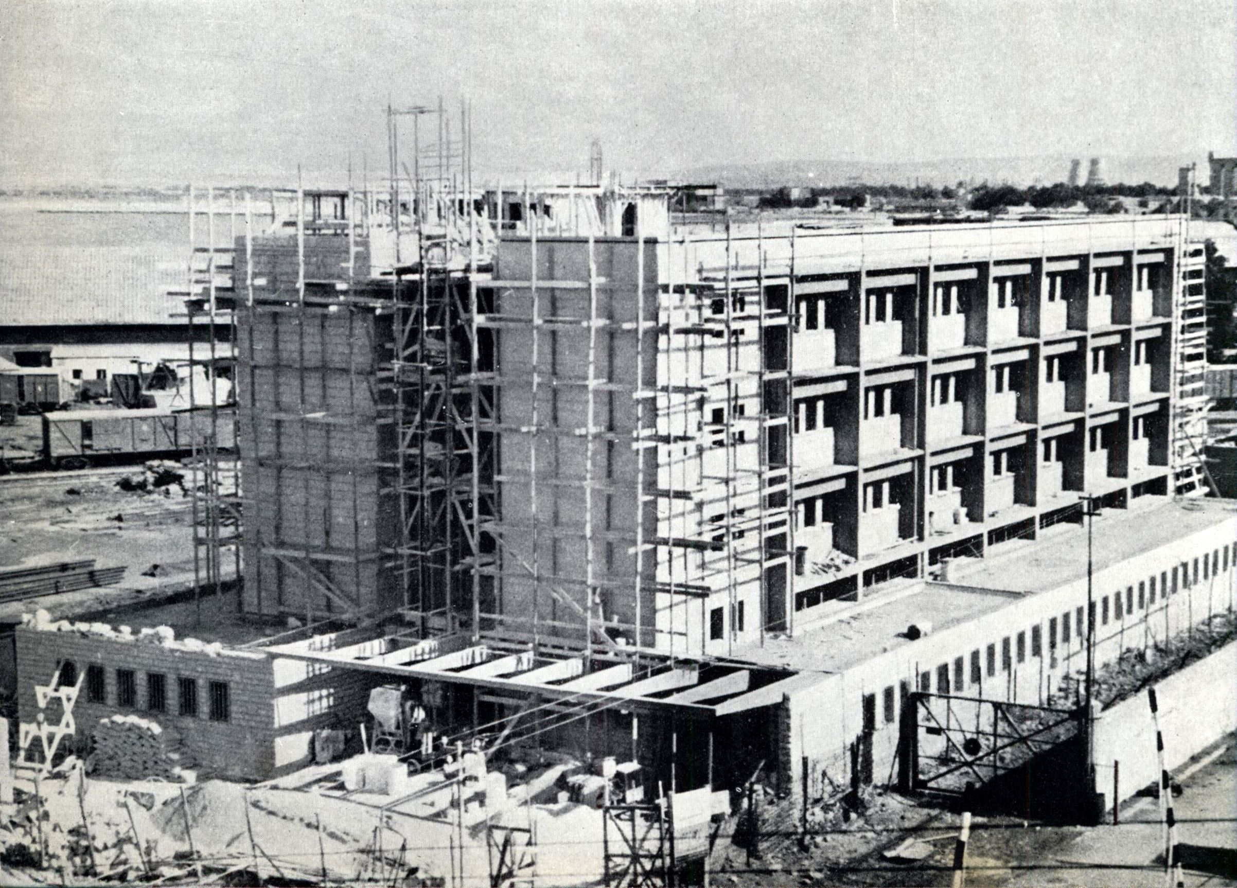 בית המכס והבלו, חיפה